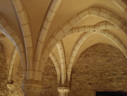 Crypte de l'ancien Hôtel-Dieu de Saint-Marcel (Indre)